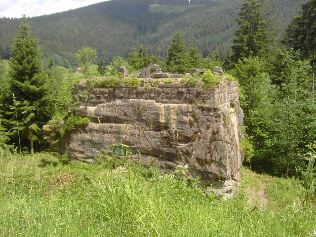 Ruine Tannenfels (Obertal)